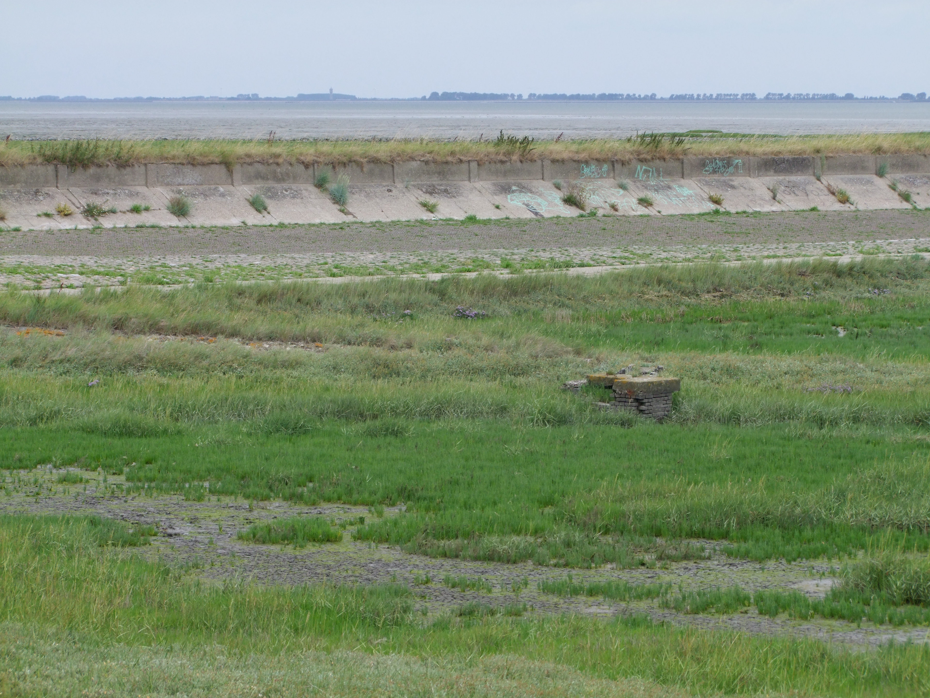 vanaf de voet van de dijk in NW-richting